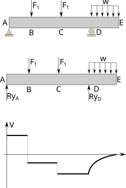 Grafíco de esforço cortante me viga